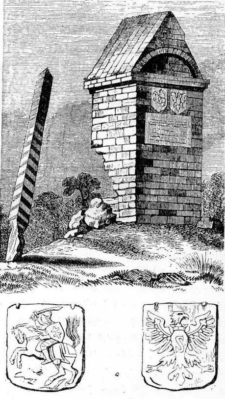 Ilustracja Encyklopedii staropolskiej T.4 098 - Słup graniczny z 1545 r., we si Bogusze nad rzeką Łykiem